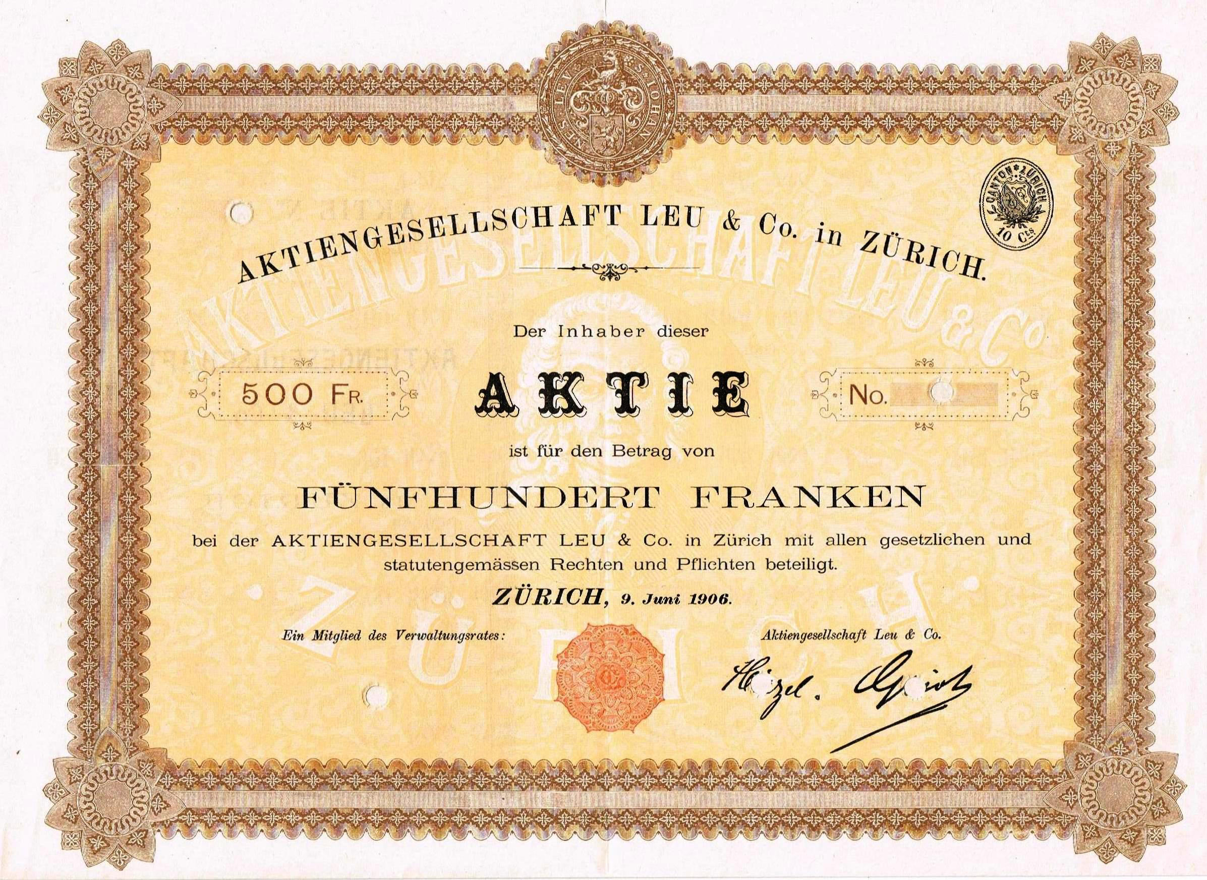 Aktie über 500 Franken der AG Leu & Co. vom 9. Juni 1906